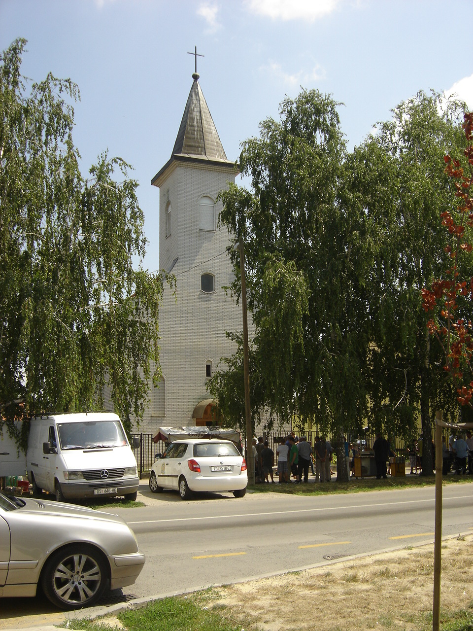 Katolička crkva svete Ane u Tenji